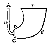 hydrostatische paradox, schets in boek van Stevin neem ik aan